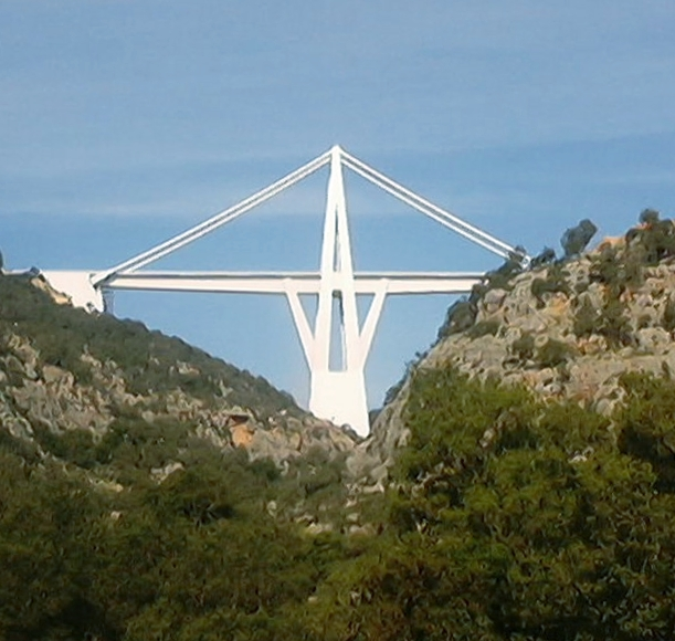 Vista del ponte sull'wadi Kuf